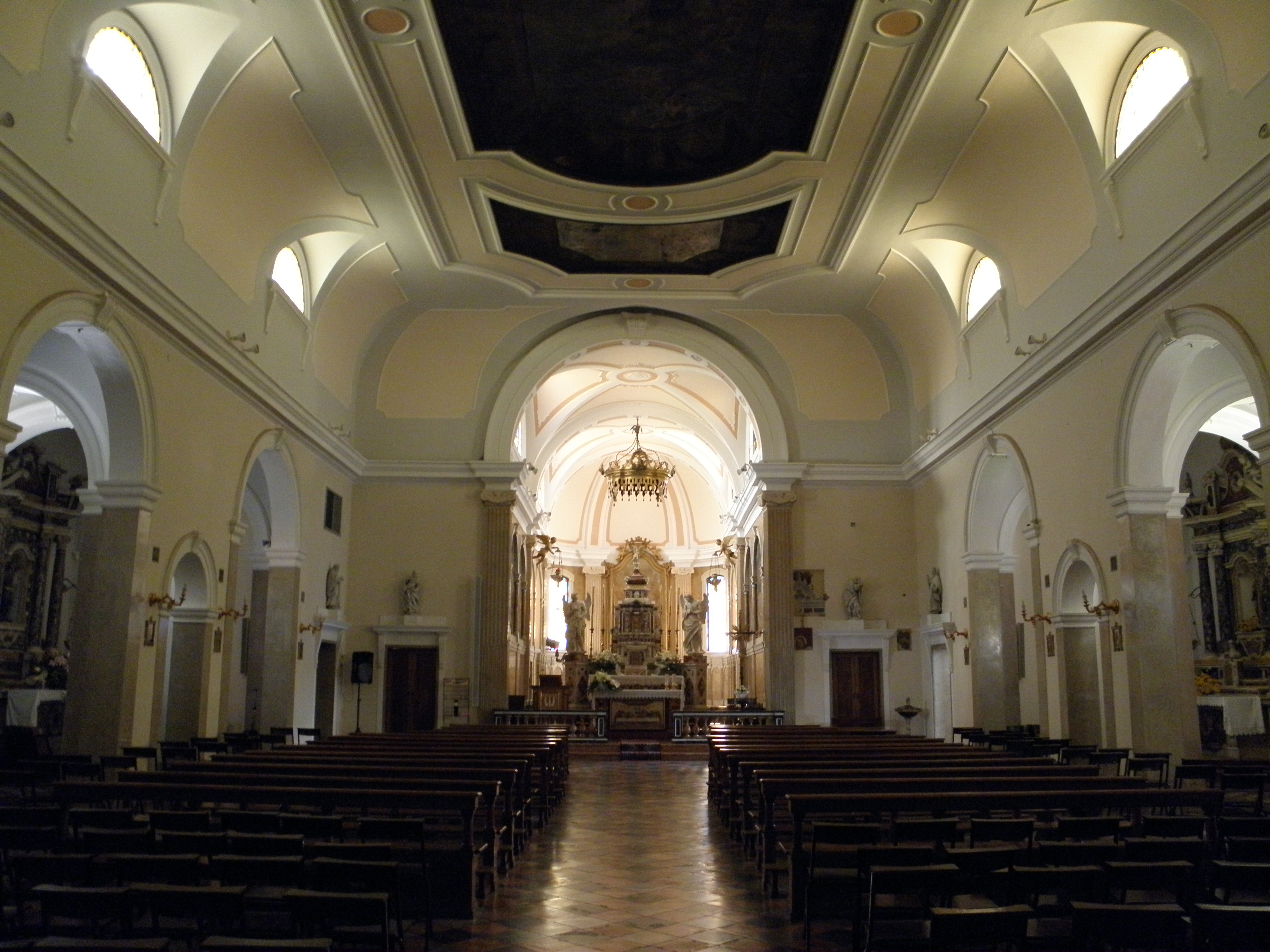 Grignano Polesine, frazione di Rovigo: chiesa parrocchiale di Santa Maria Assunta, interno, vista generale.